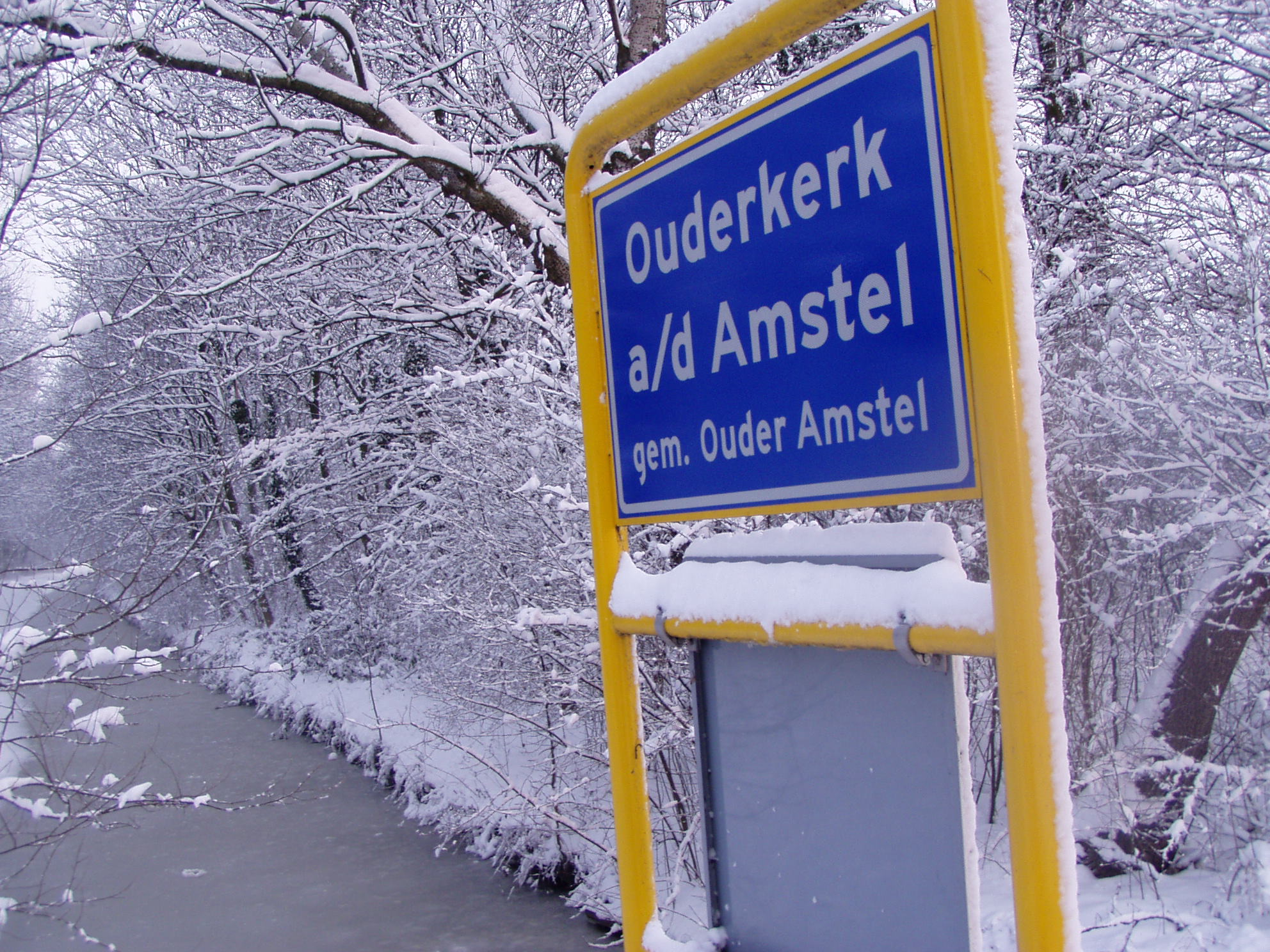 Plaatsnaambord Ouderkerk aan de Amstel